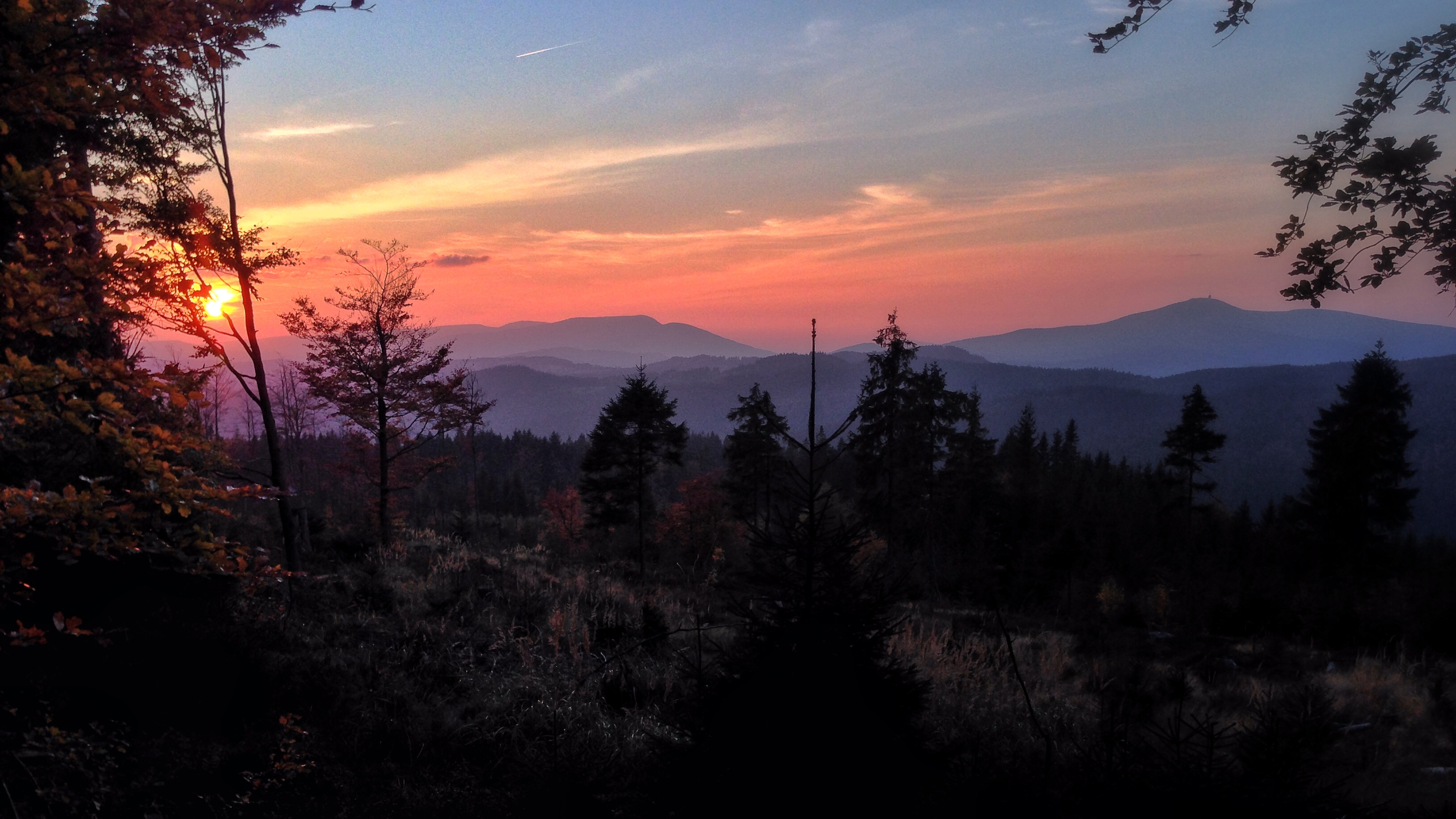 Výhled z Uhorské (1029 m) na Smrk (vlevo) a Lysou horu (vpravo)